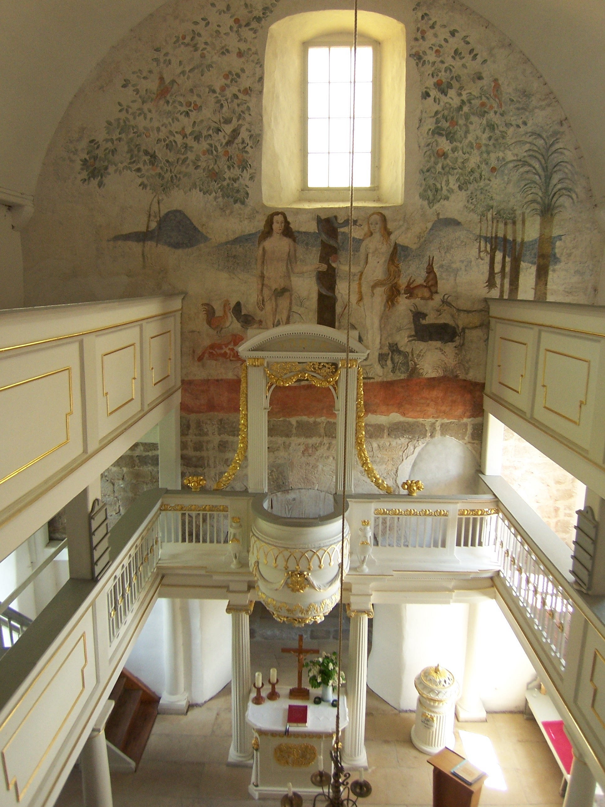 sehenswerte Wehrkirche in Wipfra mit lebensgroßer Wandmalerei von „Adam und Eva im Paradies“